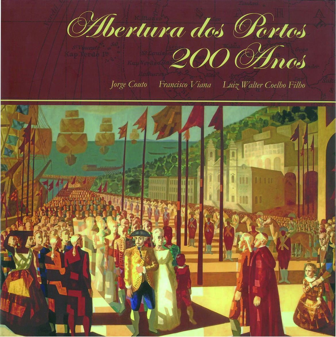 Book "Abertura dos Portos 200 anos", Jorge Couto